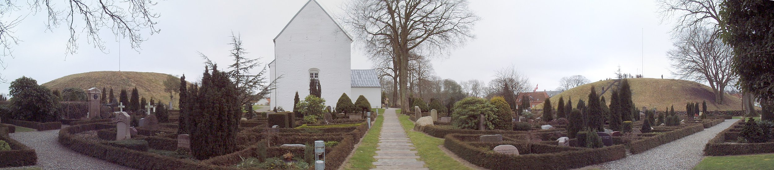 Panorama mit den beiden Grabhügeln, den beiden Runensteinen und der Kirche von Jelling, 16. Februar 2004